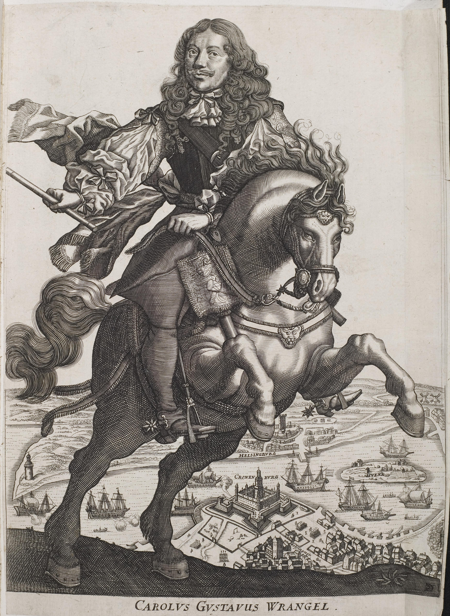 Grafik aus dem Klebeband Nr. 2 der Fürstlich Waldeckschen Hofbibliothek Arolsen Motiv: Carl Gustaf Wrangel